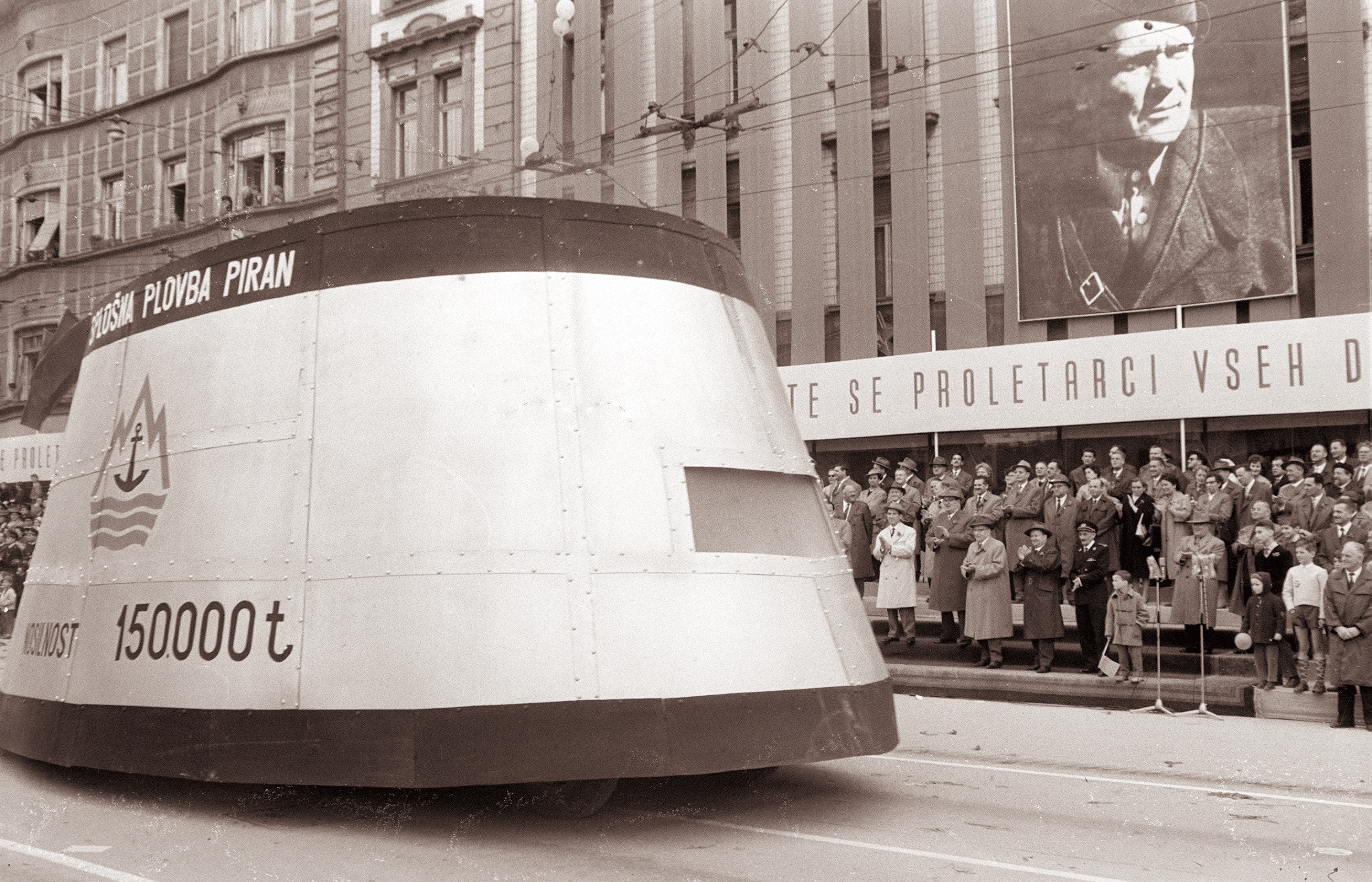 Prvomajski sprevod v Ljubljani